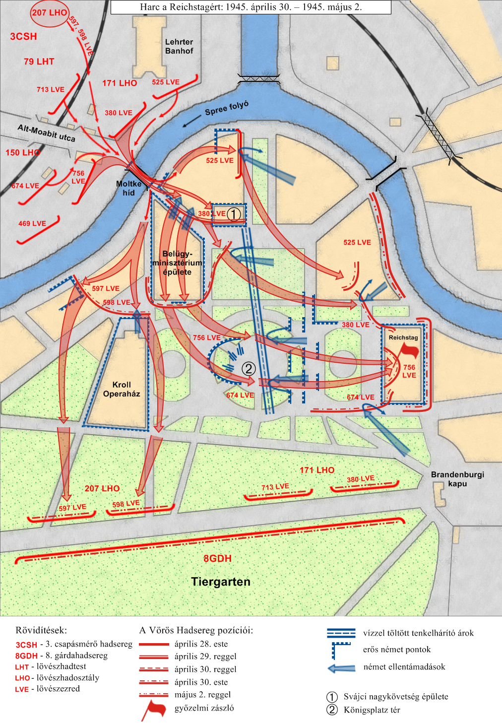 1945 április-május- a Reichstagért folyó harc